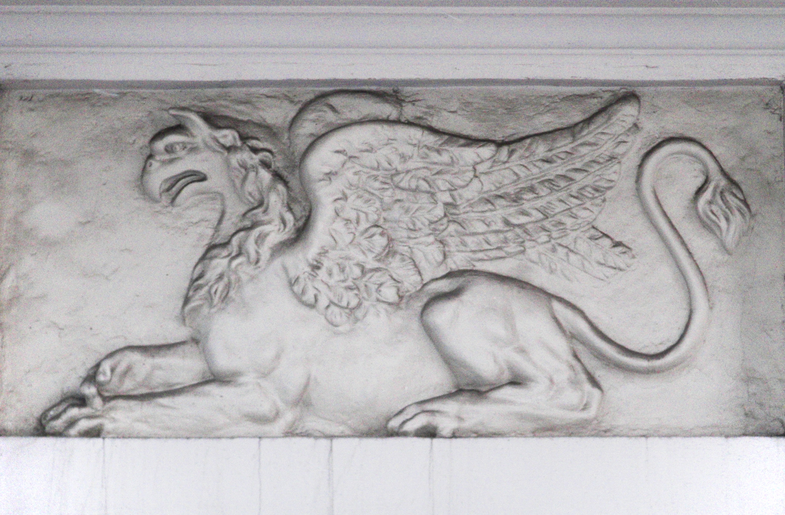 Sejm RPdetale: gryf na ścienie rogatek przy budynkach Kancelarii Prezydenta